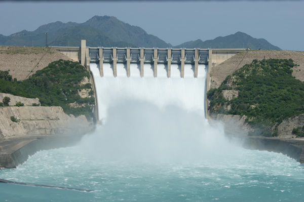 Tarbela Dam in Khyber Pakhtunkhwa, Pakistan.